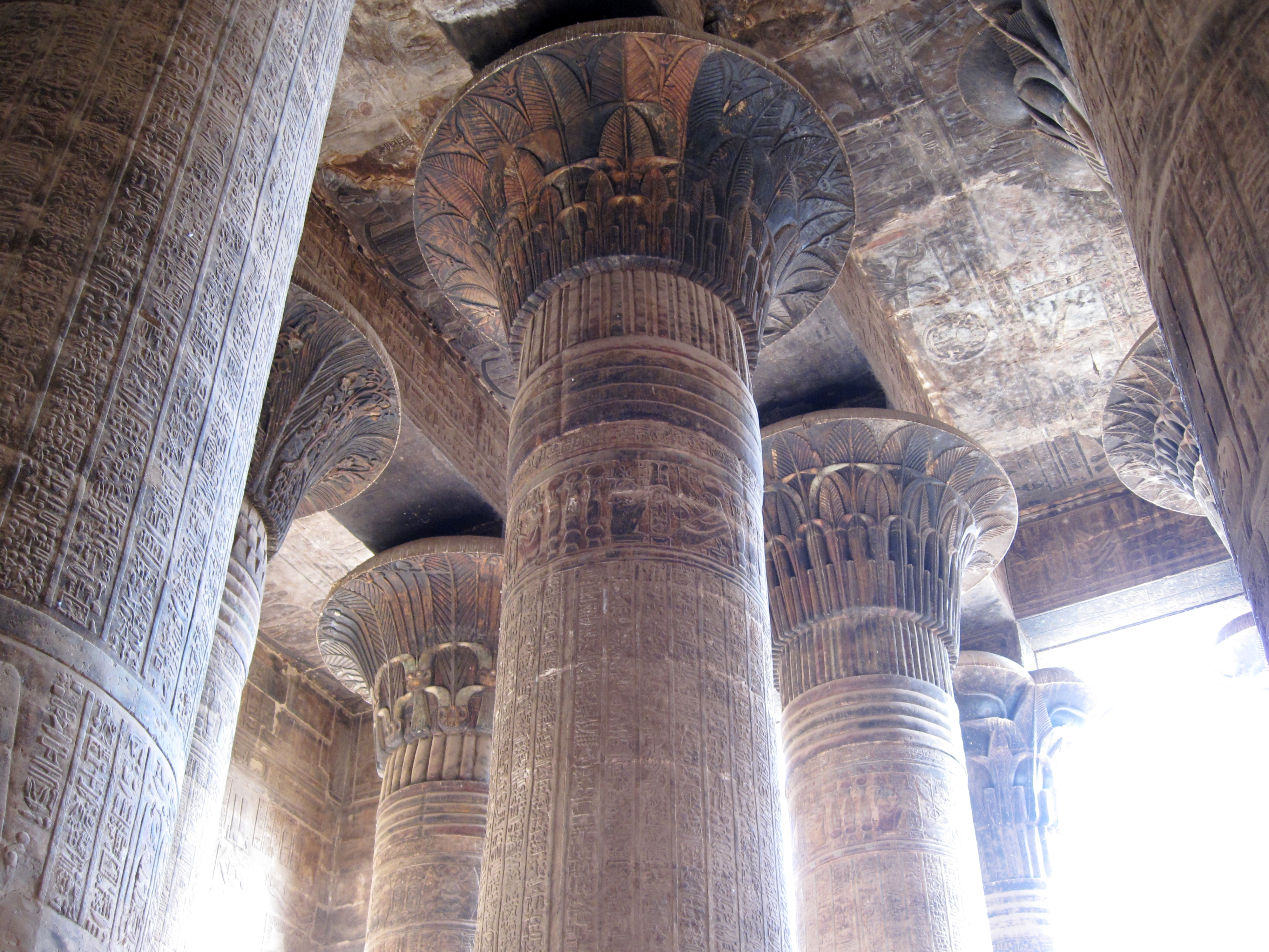 Chnum-Tempel in Esna, Ägypten